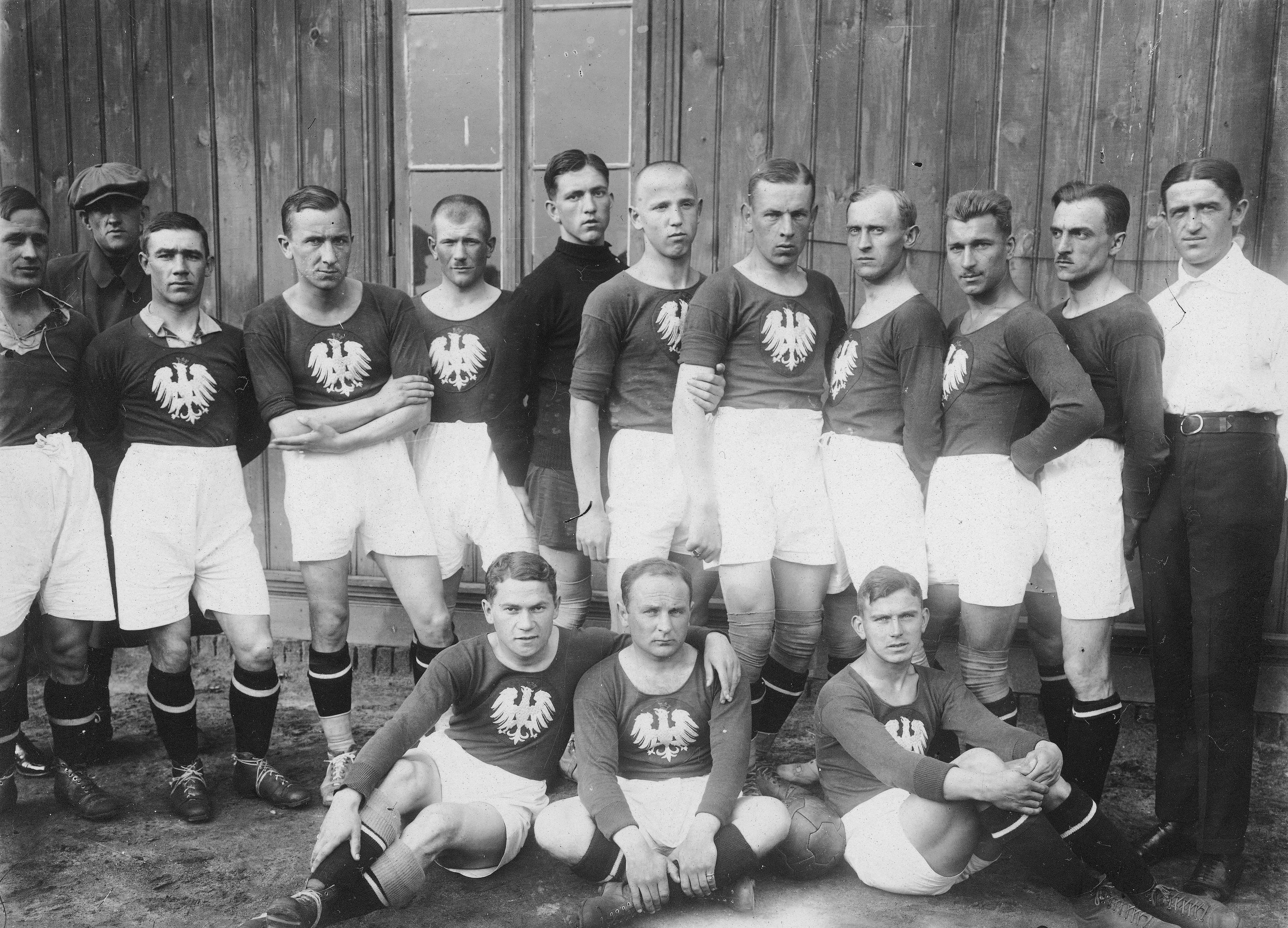 Reprezentacja Polski podczas meczu piłki nożnej Polska – Turcja w Łodzi na stadionie ŁKS (29.06.1924). Stoją od prawej: sędzia Mihaly Ivancsics, Jan Loth, Józef Adamek, Wawrzyniec Cyl, kapitan Henryk Reyman, Mieczysław Balcer, Emil Goerlitz, Władysław Karasiak, Władysław Kowalski, Jan Durka (rezerwowy). Siedzą od prawej: Marian Spoida, Zygmunt Otto, Karol Hanke.